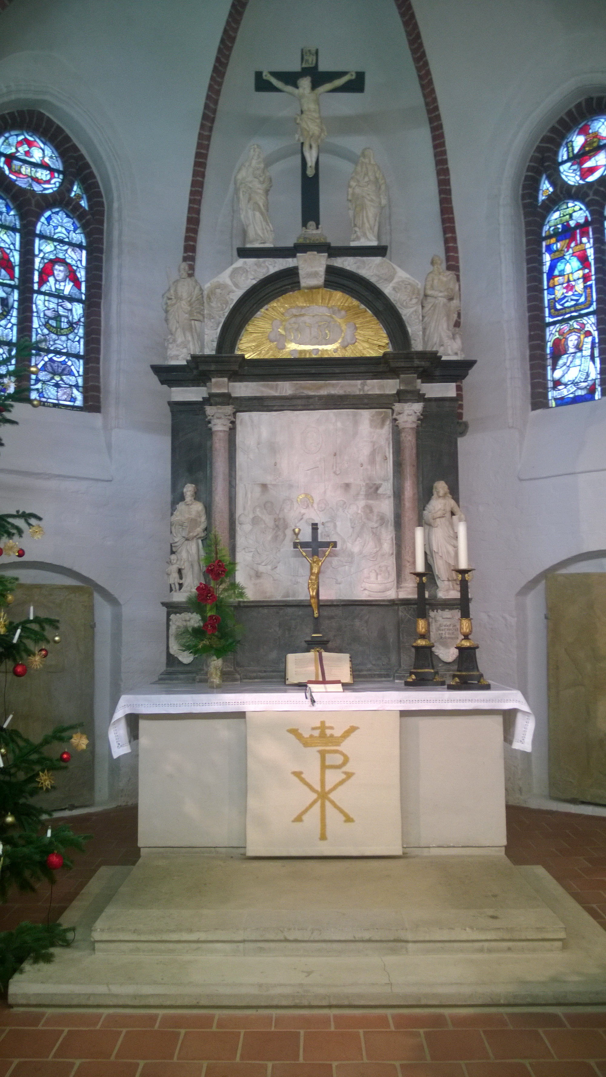 Kanzel St. Marien Kirche Plate